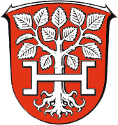 Wappen von Birkenau (Odenwald)